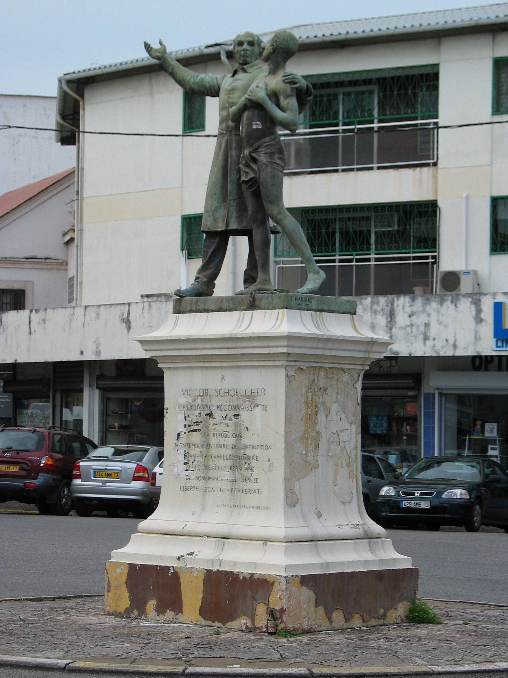 Statue de Victor Schoelcher au centre de la place du même nom. Photo prise par moi-même en 2003.